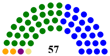 El titulo se explica solo